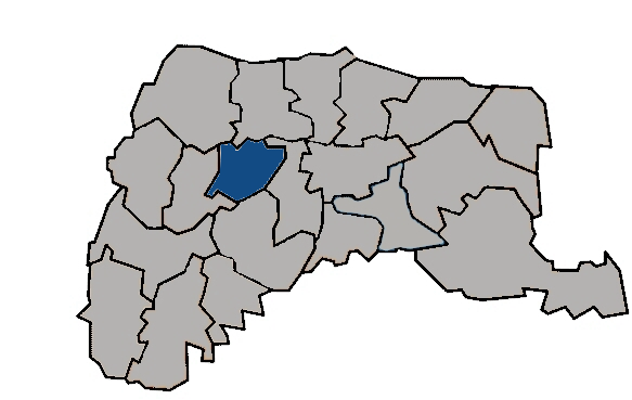 台灣省雲林縣褒忠鄉 KaurJmeb於2005年1月29日為編輯zh:褒忠鄉所繪製